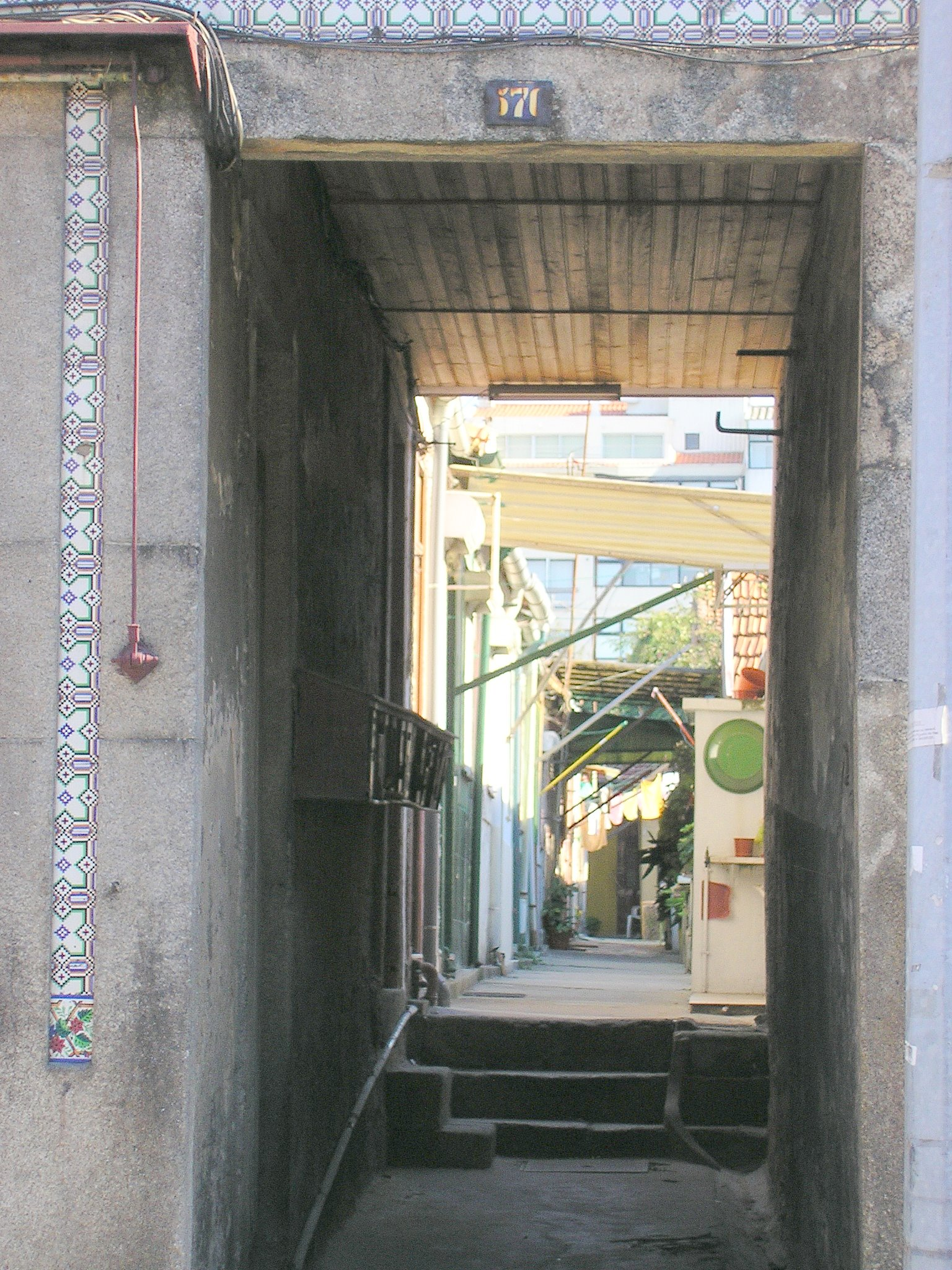 "ilha", 19th century workers' houses in Porto, Portugal, na Rua de São Brás, 570